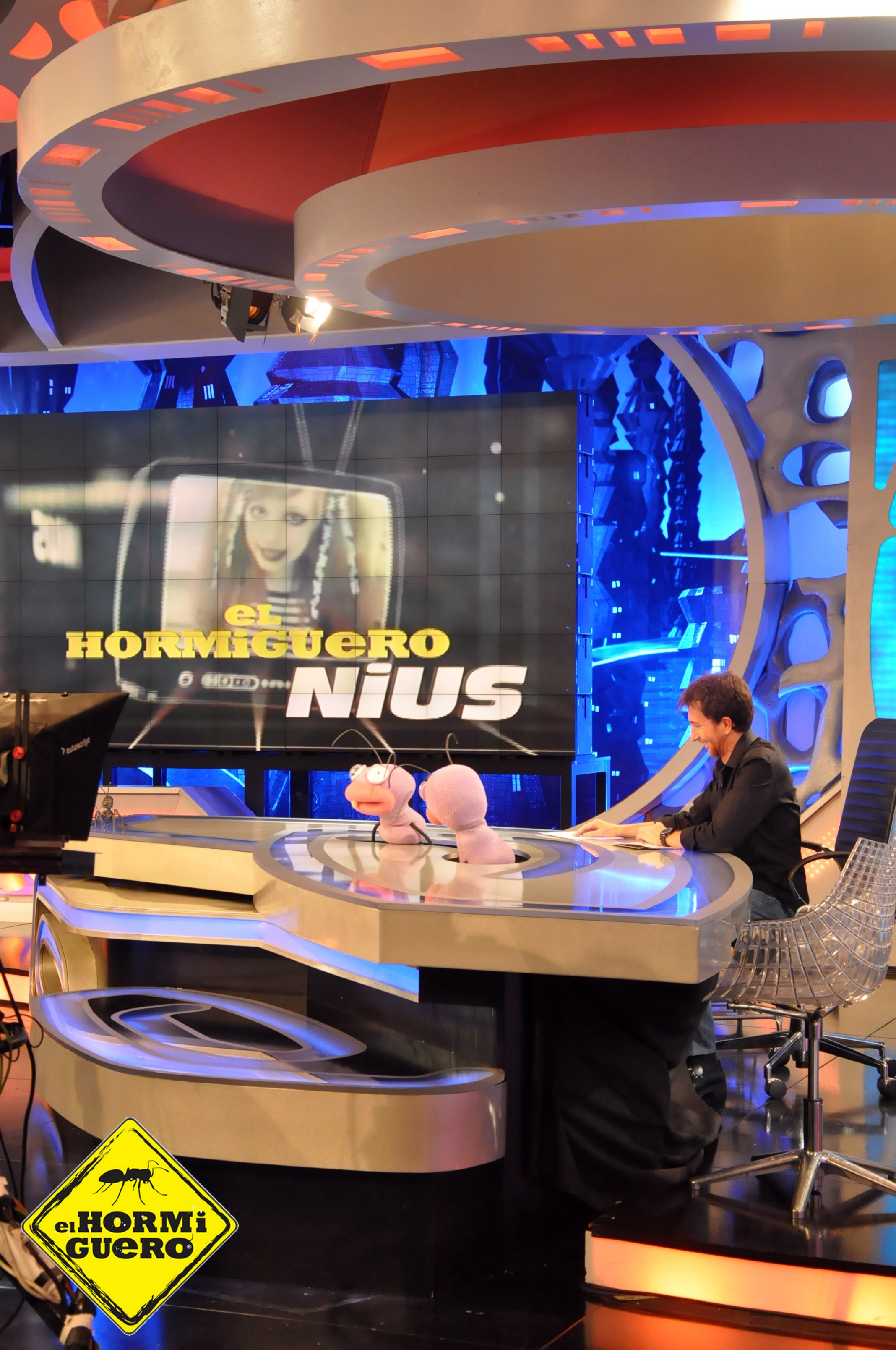 Imagen el Plató de El Hormiguero en un momento de Hormiguero Nius, presentado por Pablo Motos, y las hormigas Trancas y Barrancas.